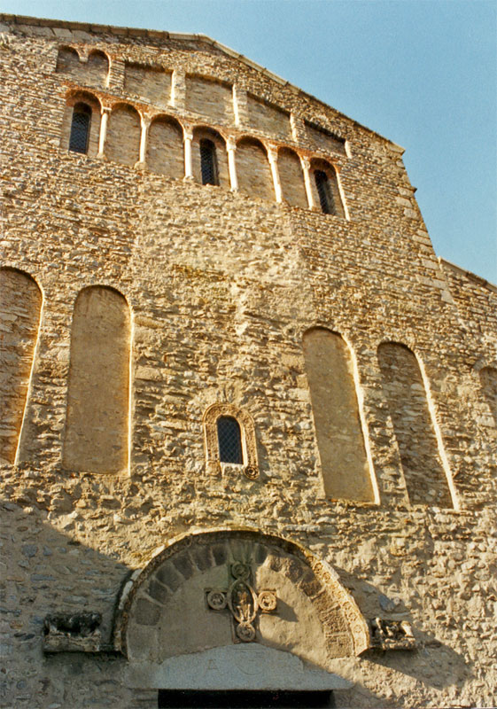 Abadia de Santa Maria d'Arles. Vallespir, França